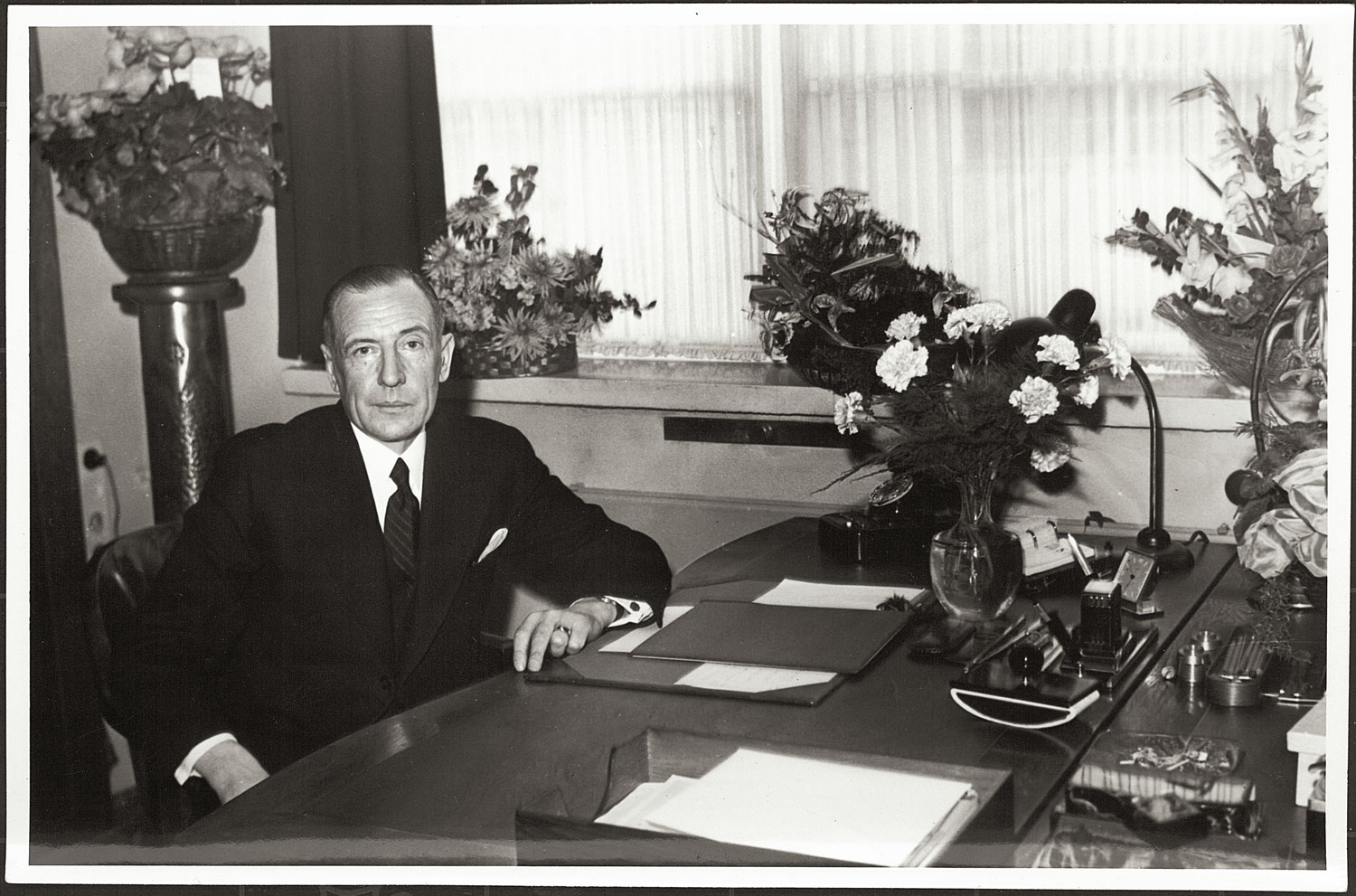 Kapteeni Rafael Lönnström. Kuva Teresia ja Rafael Lönnströmin kotimuseo.